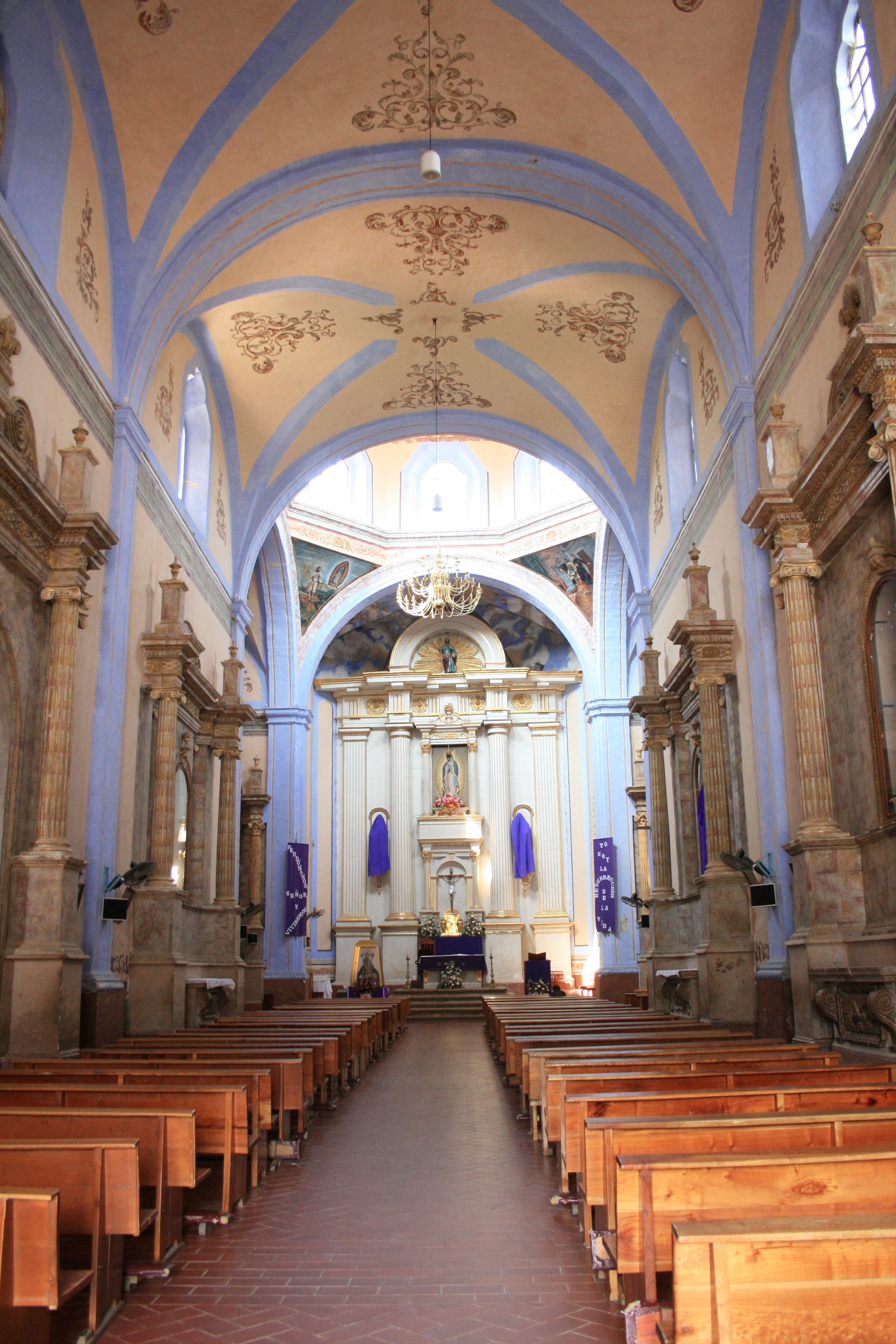 Misión de Santiago de Jalpan